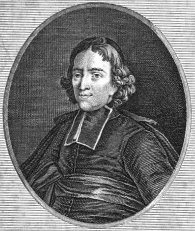 "J. Meslier", gravure (portrait rétrospectif ?) publiée dans Le Bon sens du curé J. Meslier, suivi de son testament, Paris, 1802.